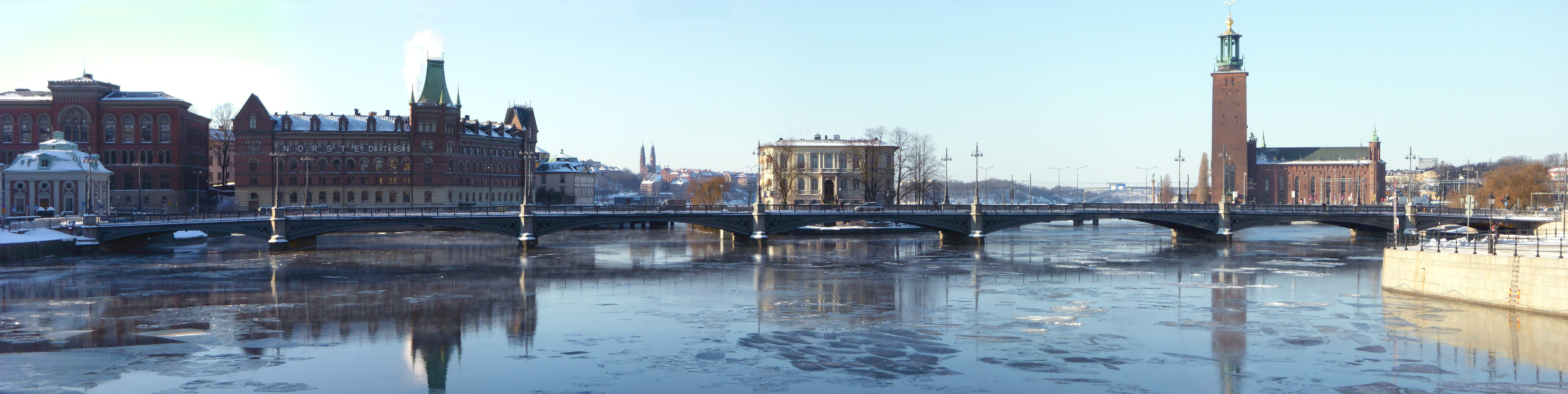 Vasabron i Stockholm sedd från Riksbron